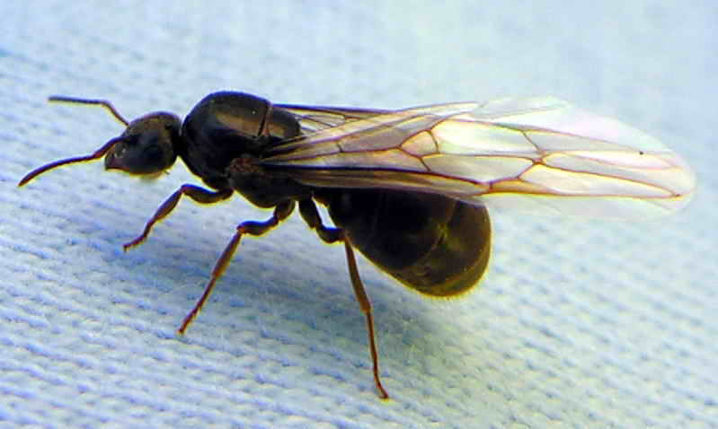 Foto tirada cunha Nikon E8800. Self made Bastabales - Galicia - Spain